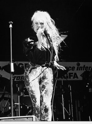 Agatha de Co sur la scène des Francofolies en juillet 1988